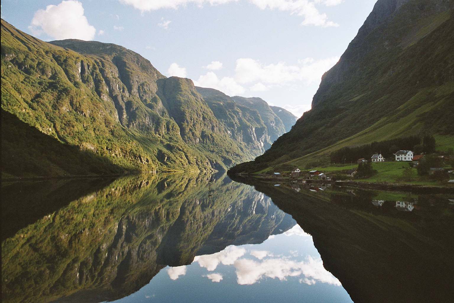 Oslo - Bergen, Nærøyfjorden